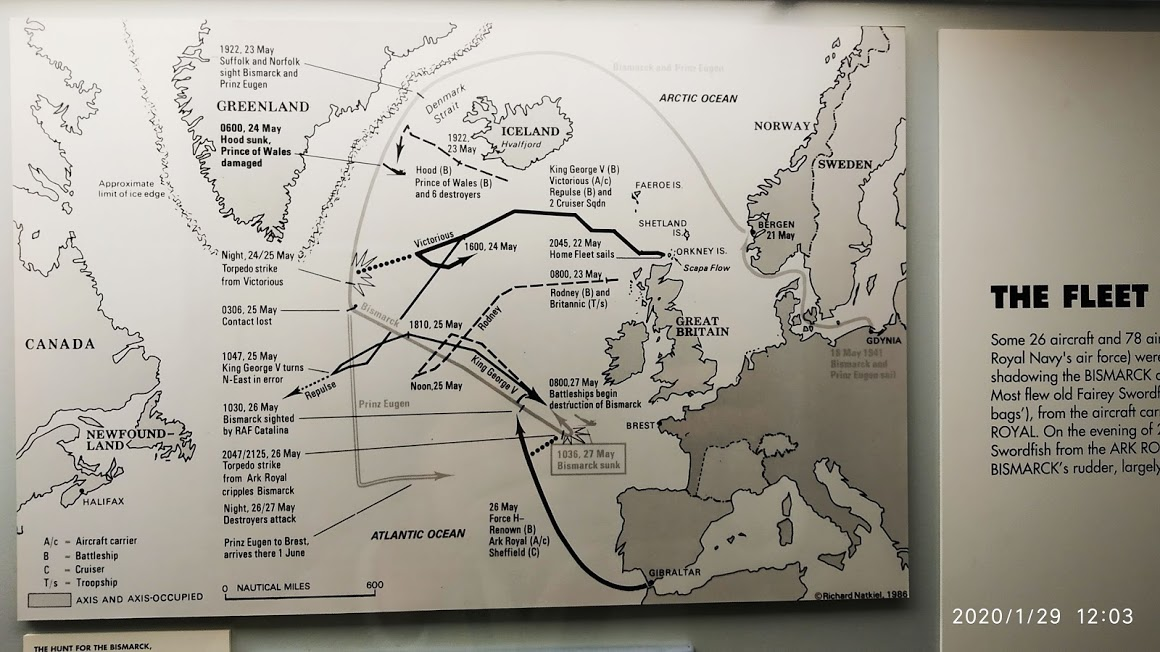 Liverpool, Muzeum Morskie. Plansza prezentująca chronologię pościgu i zatopienia "Bismarcka". Walkę "Pioruna" skryto pod ogólnym określeniem "atak nieszczycieli"..